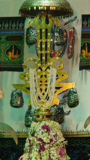 relic of bibi ka alam